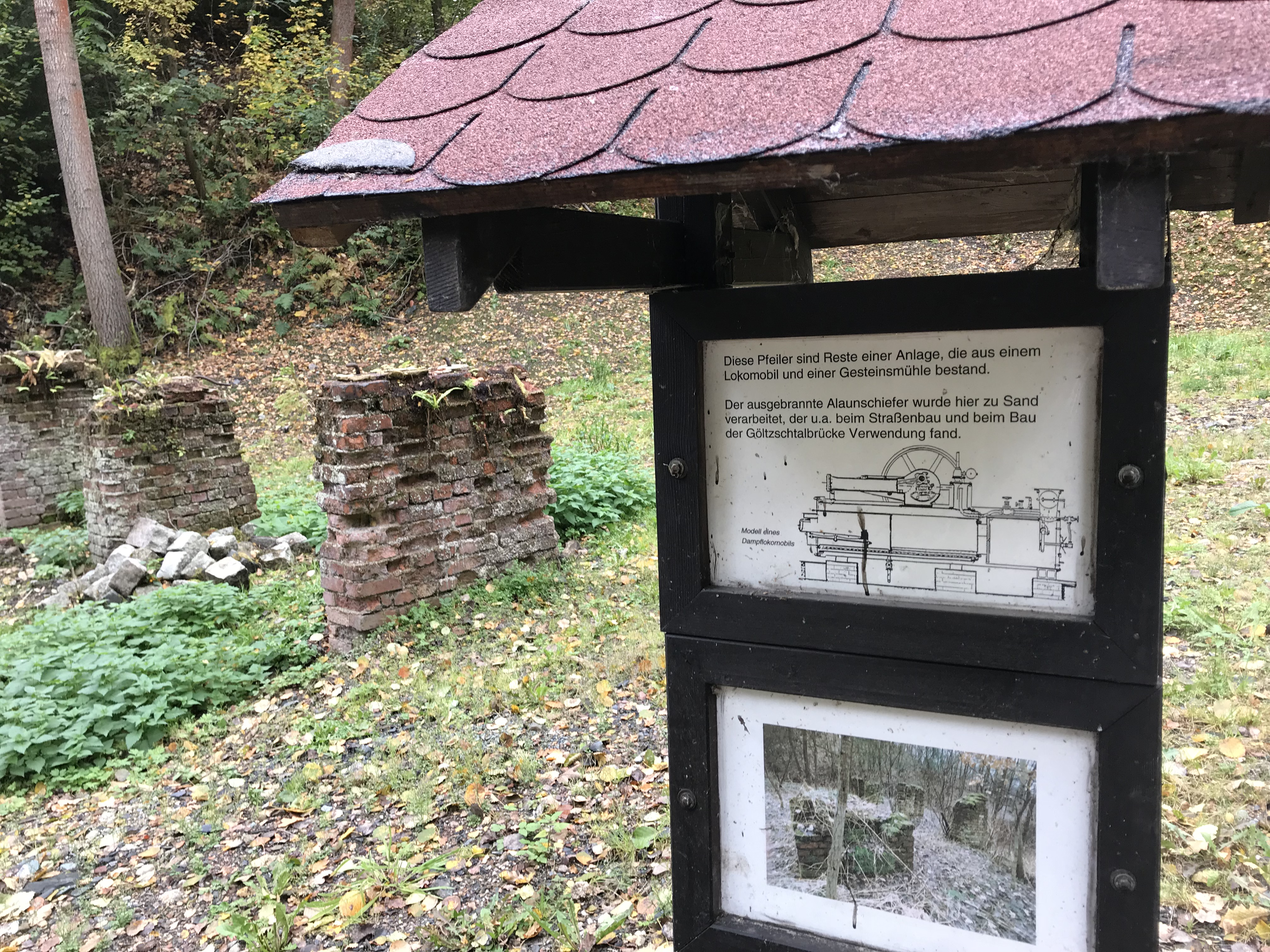 Fundament eines Lokomobile in Mühlwand ( Vogtland)